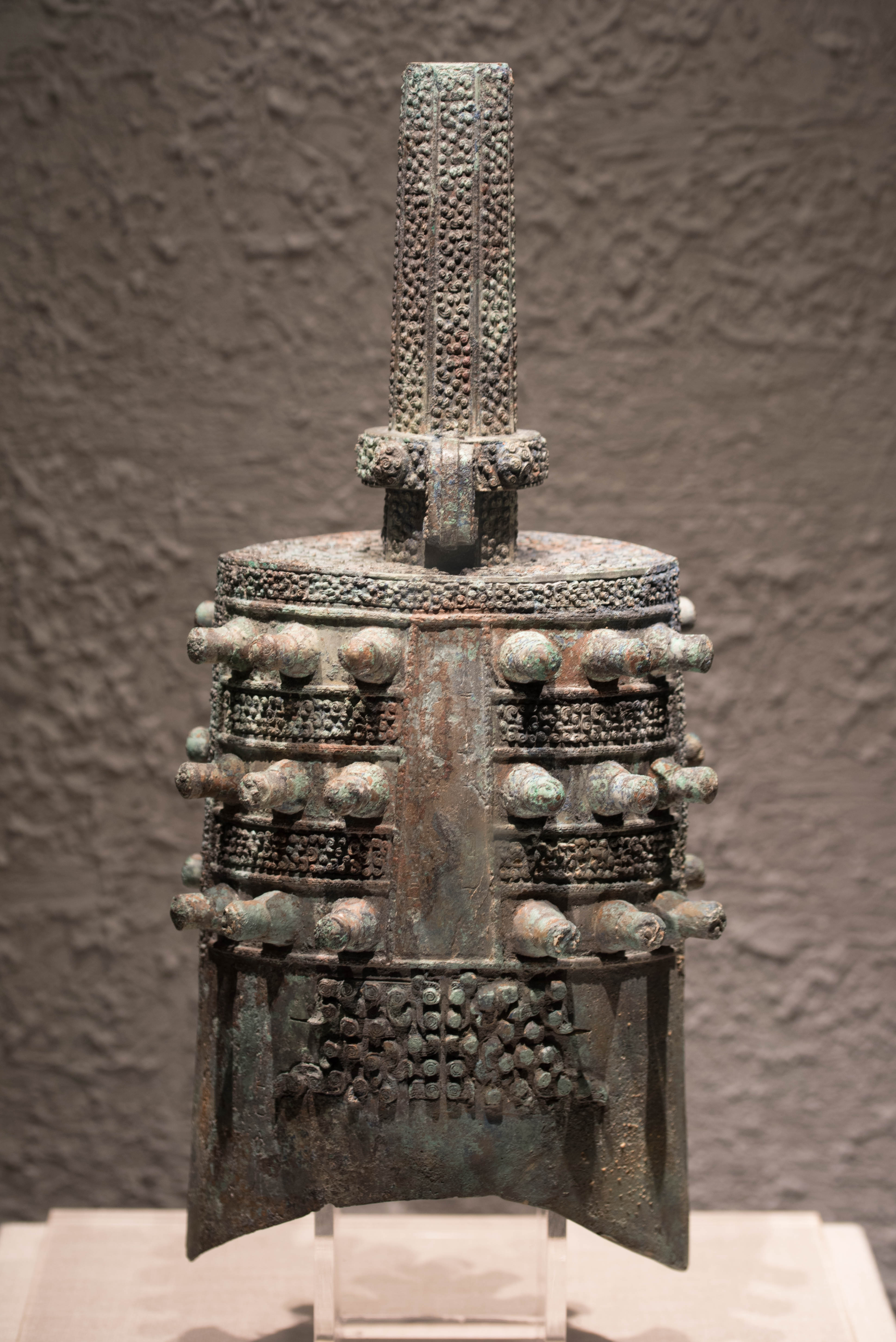 随州文峰塔墓地编钟（之一）